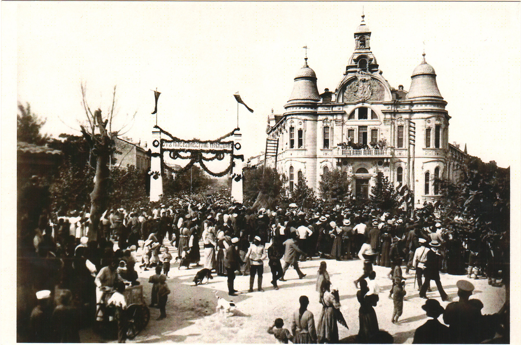 Военен клуб, Пловдив, България